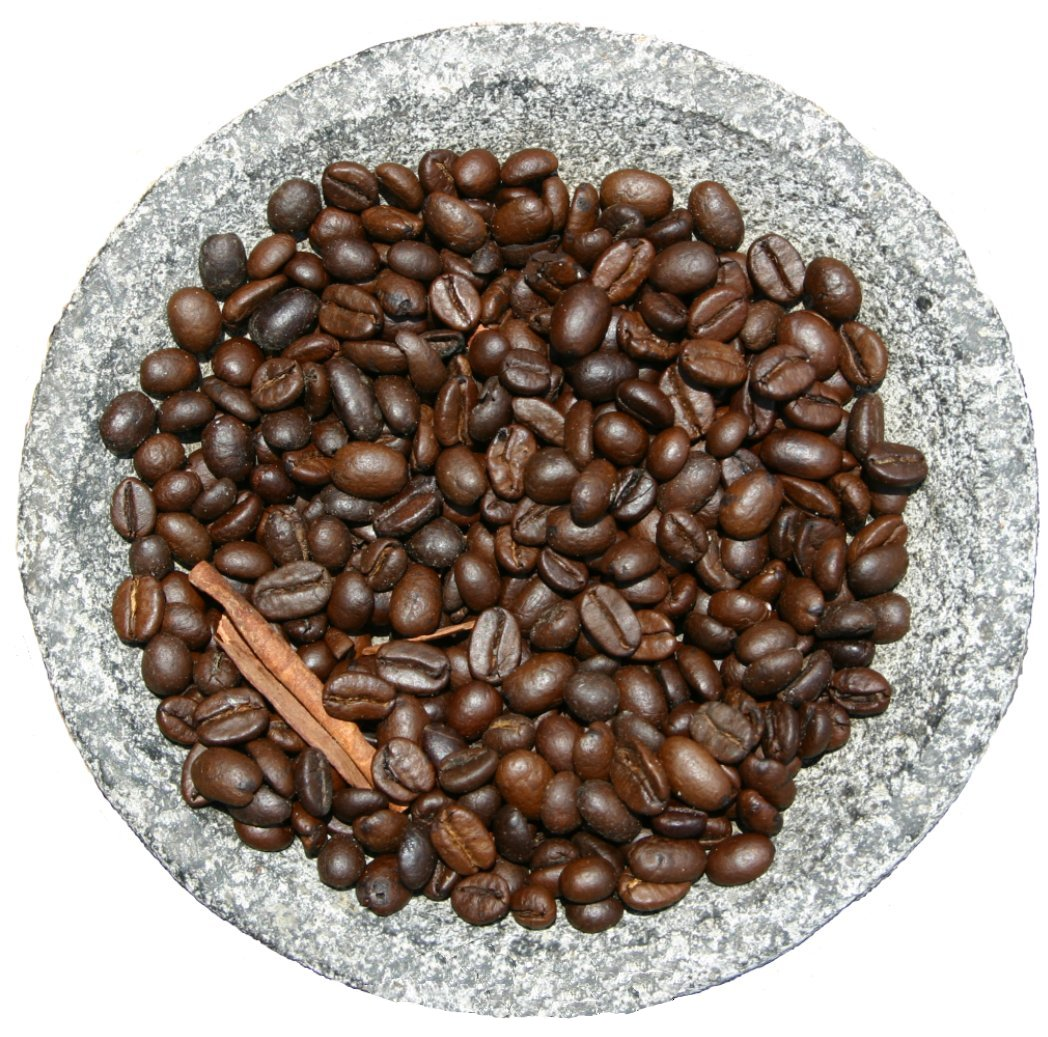 Grains de café. Exif présent pour infos complémentaires.